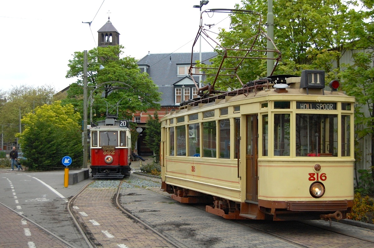 Praag 352 en Den Haag 816. Electrische Museumtramlijn Amsterdam.